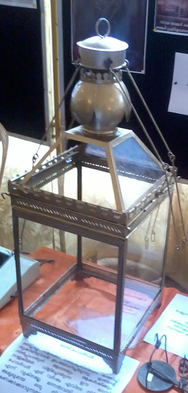 കൂടുതൽ സ്ഥലത്ത് വെളിച്ചം കിട്ടാൻ ഉപയോഗിച്ചിരുന്ന വിളക്കുപെട്ടി.